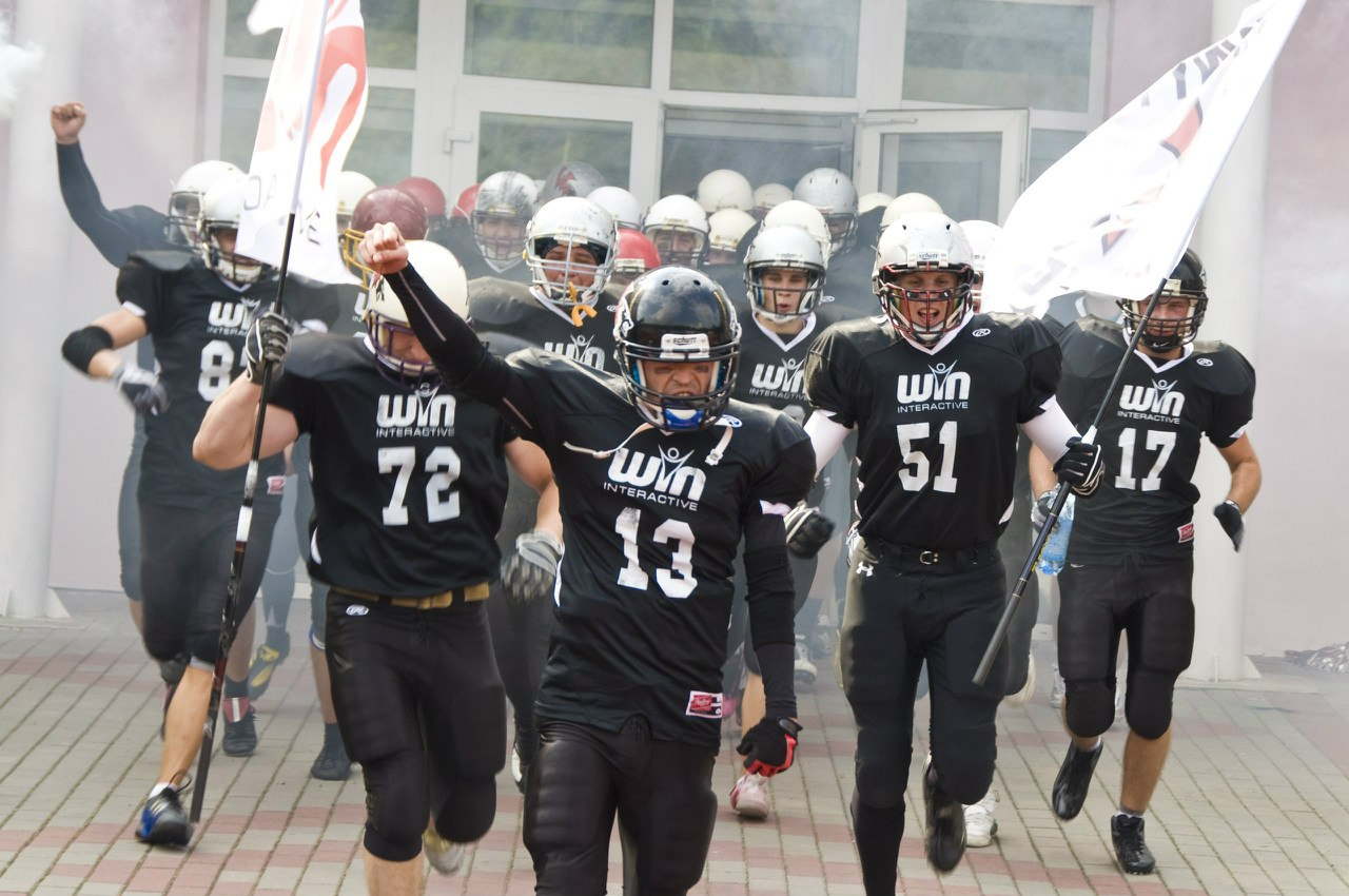 Фінал Першої ліги 2013 рік